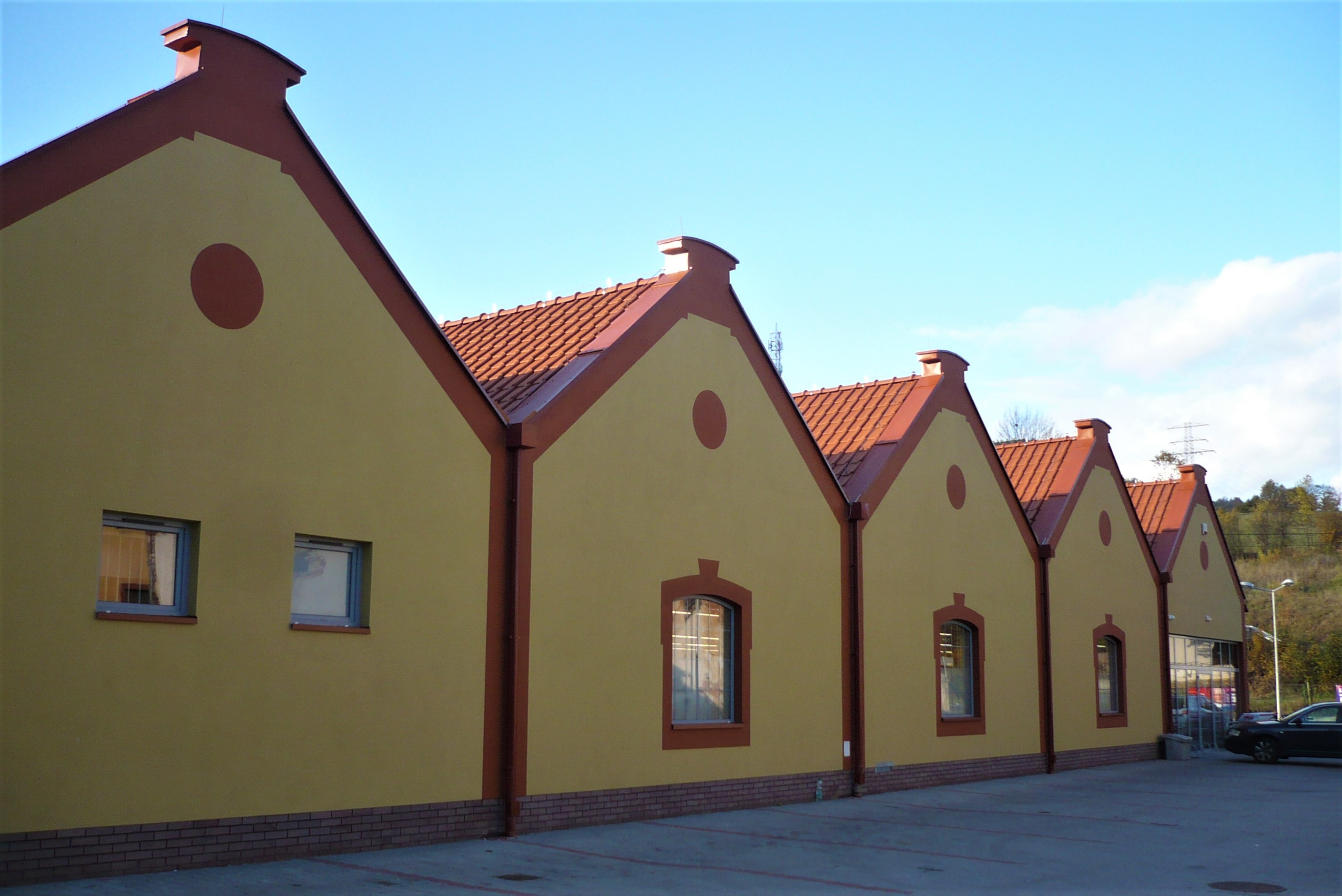 Ludwikowice Kłodzkie. Relikt przemysłowy: hale, obecnie Dino, ul. Główna 19